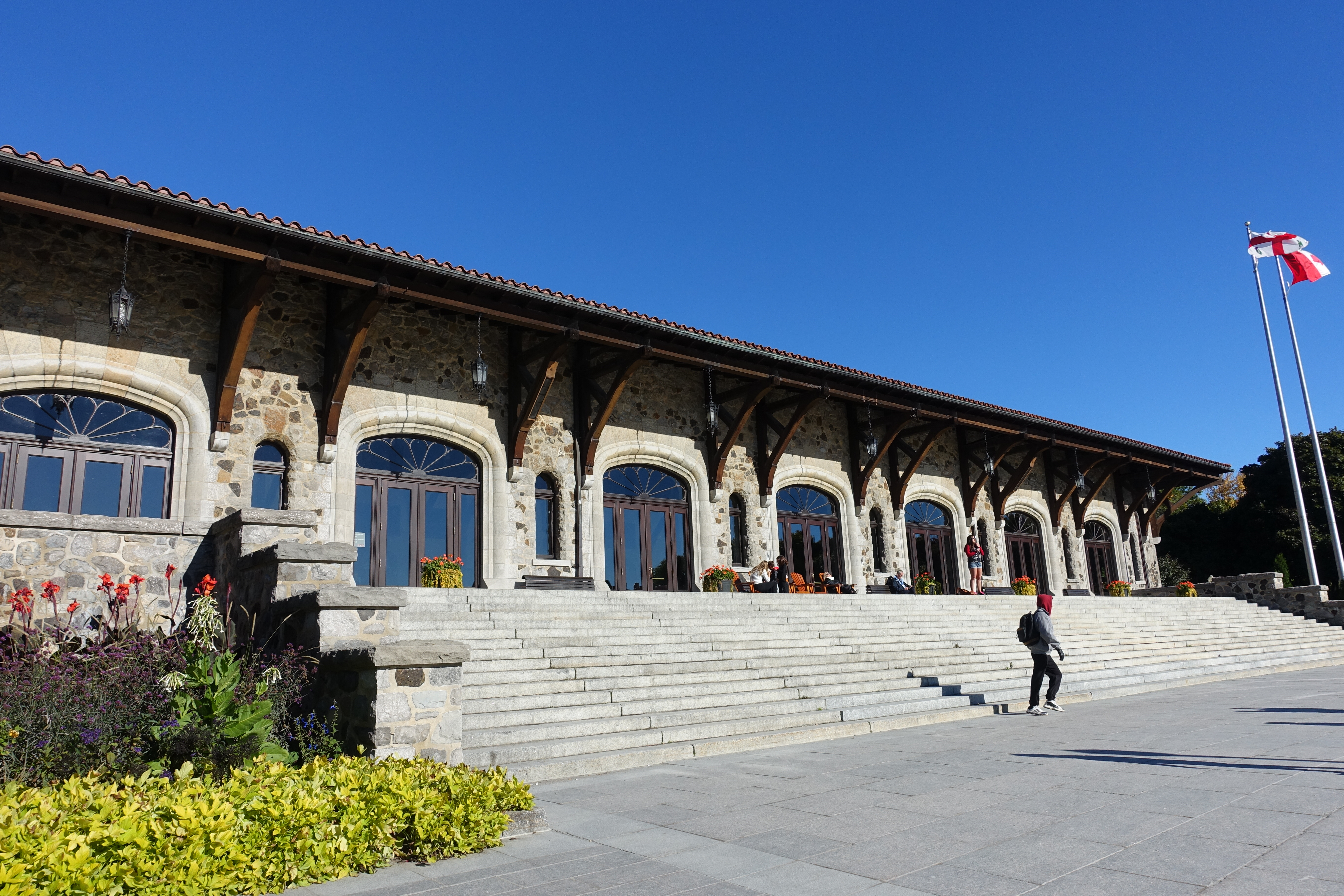 Chalet du Mont-Royal @ Mount Royal @ Ville-Marie @ Montreal